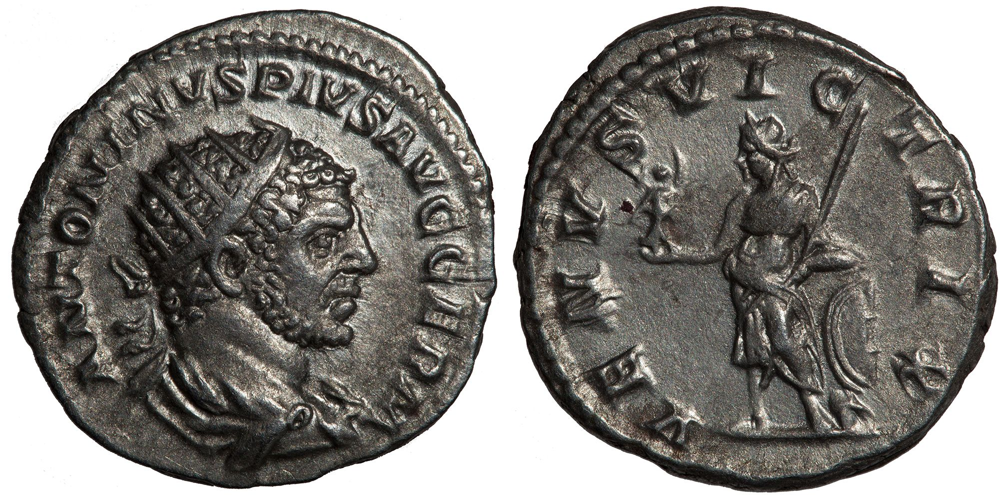 Caracalla